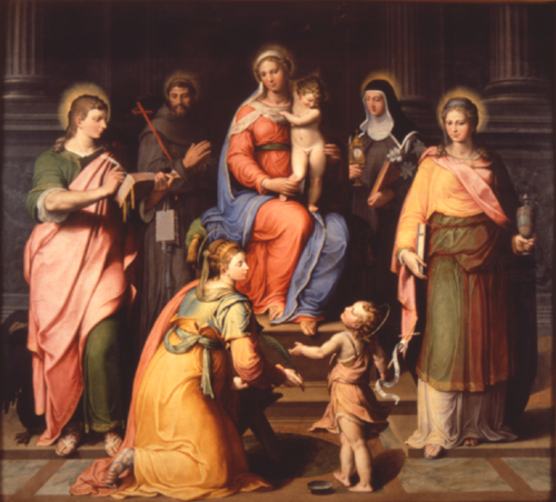 Virgen entronizada con santos, Pinacoteca Nazionale di Bologna